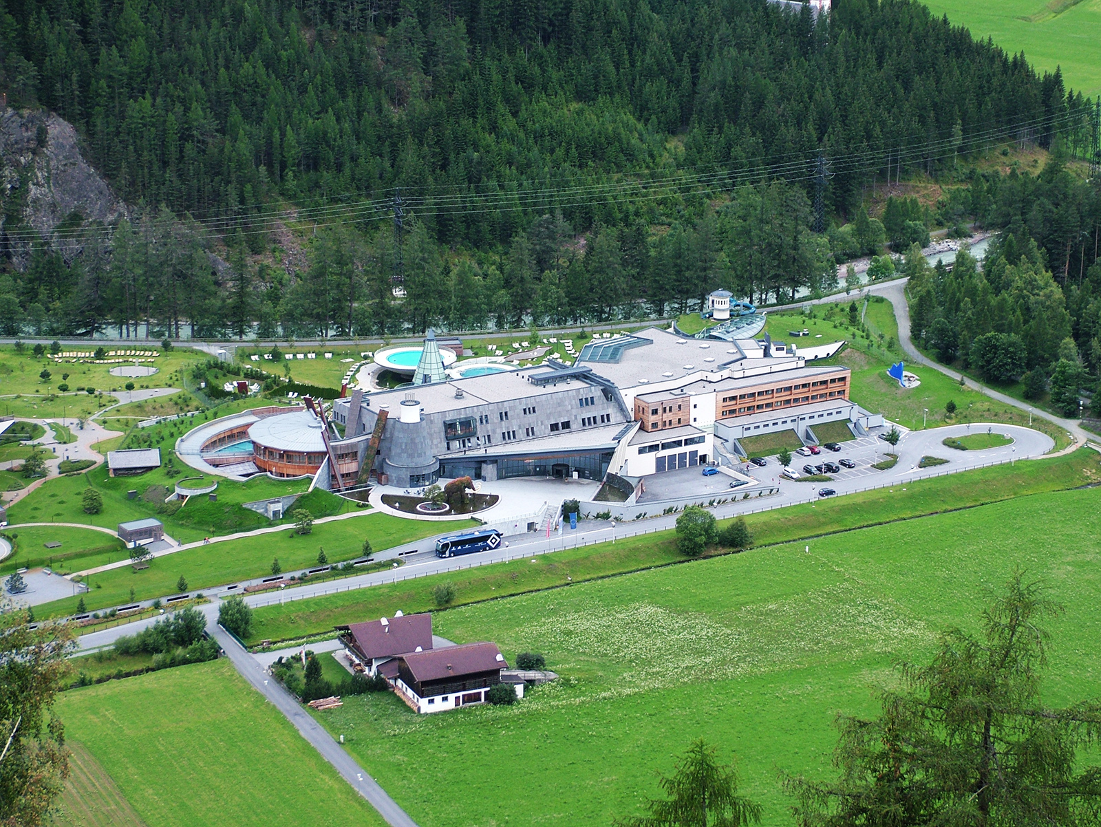 Gesamtansicht des Aqua Domes in Längenfeld